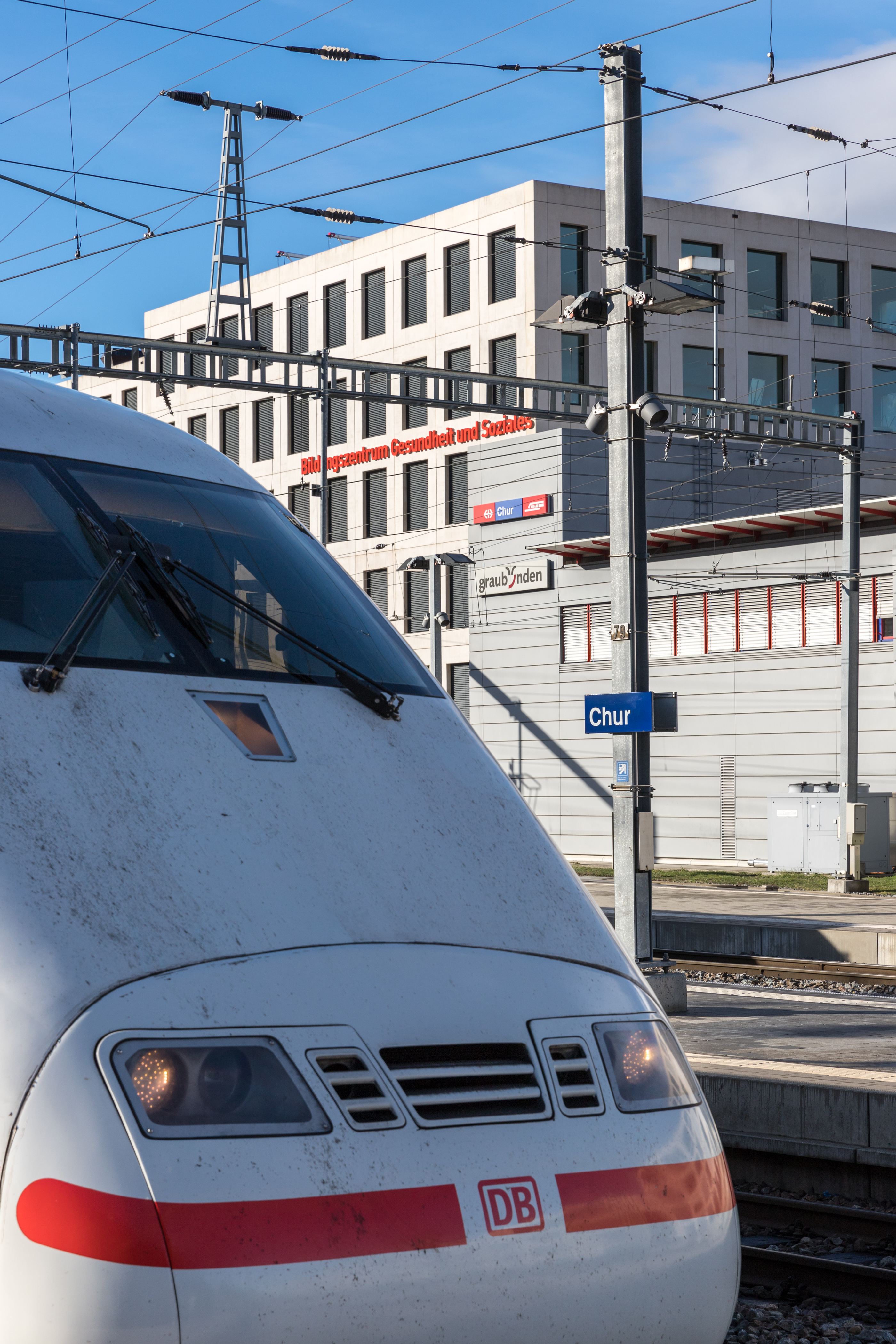 Die Bündner Hauptstadt Chur ist Start- und Endbahnhof einer ICE-Linie und verbindet die älteste Stadt der Schweiz mit Hamburg. Im Hintergrund das "Bildungszentrum Gesundheit und Soziales".